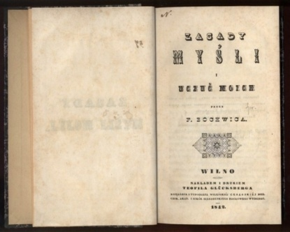 Ф. Бохвіц. Асаблівасці маіх думак і пачуццяў. 1841